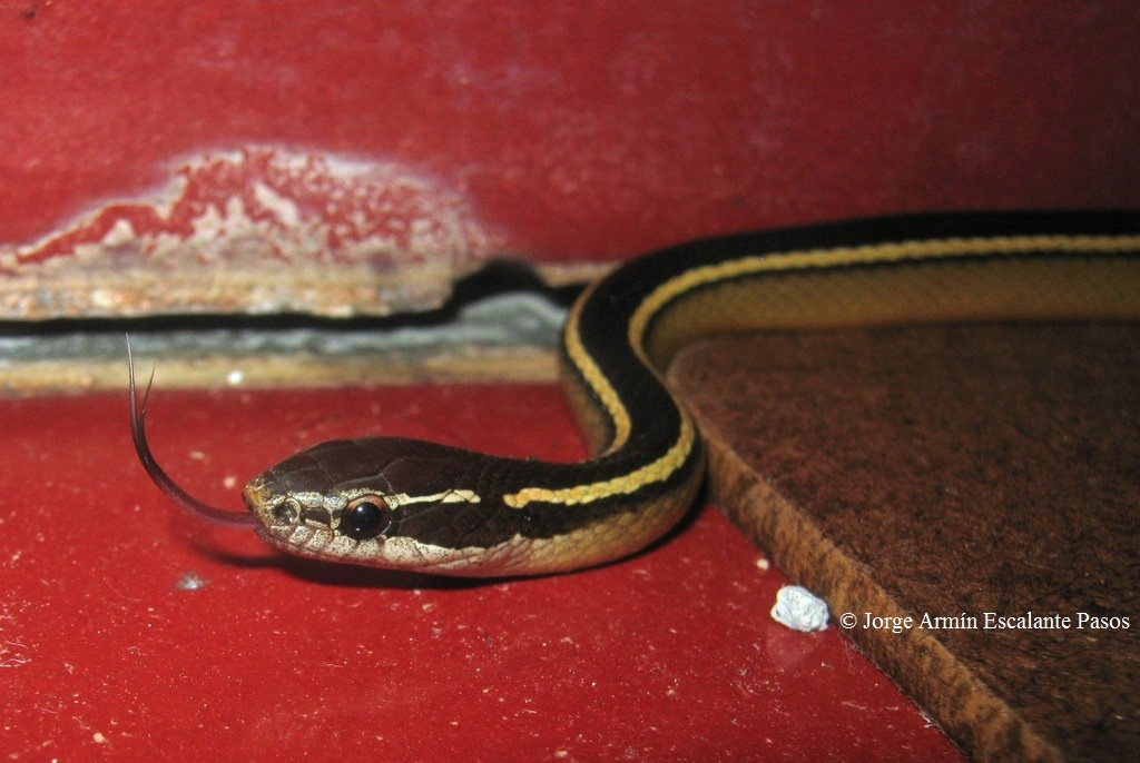 Coniophanes schmidti, Yucatán, México.